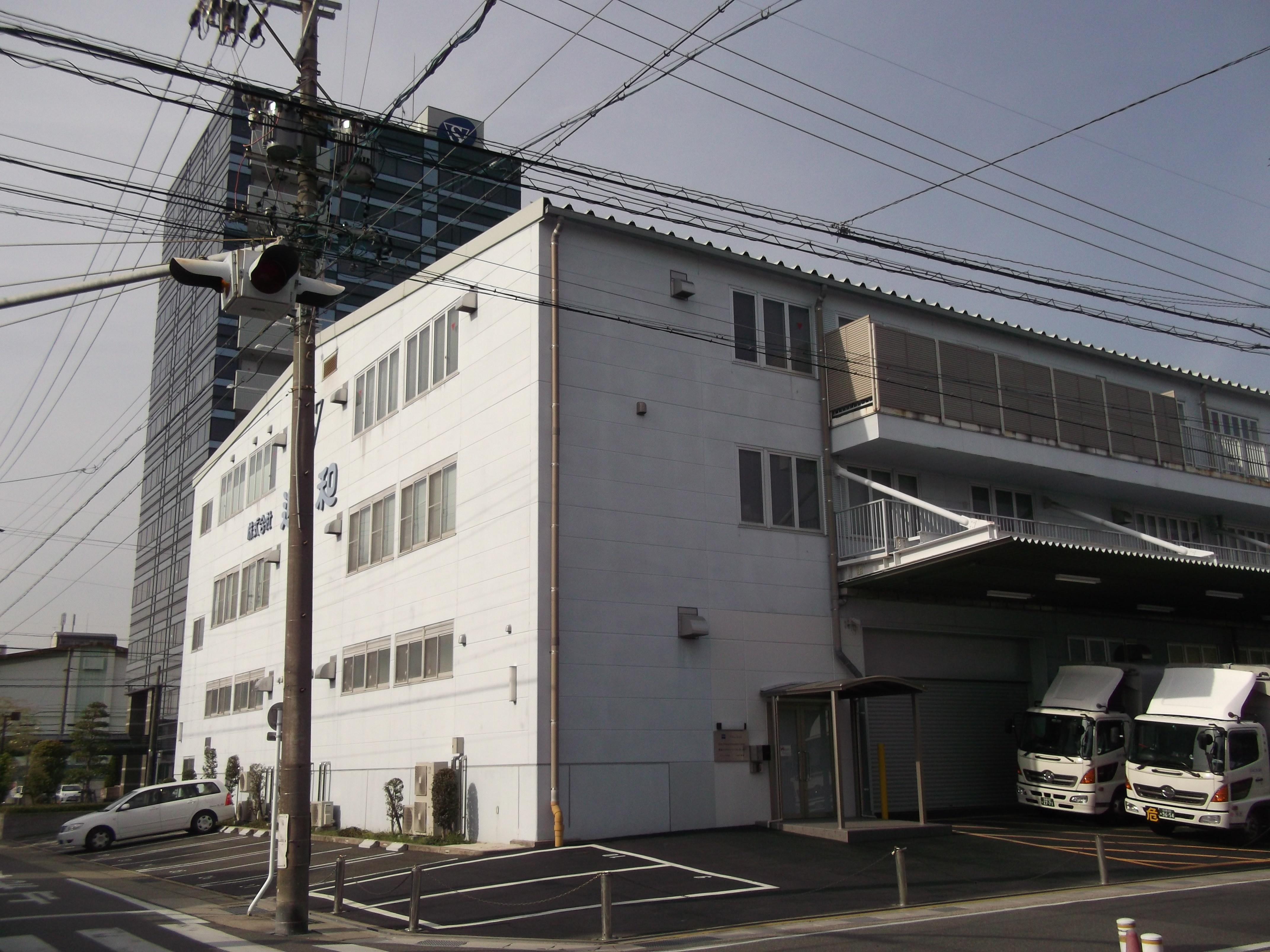 名古屋市守山区苗代二丁目の進和本社を南側公道西側より撮影